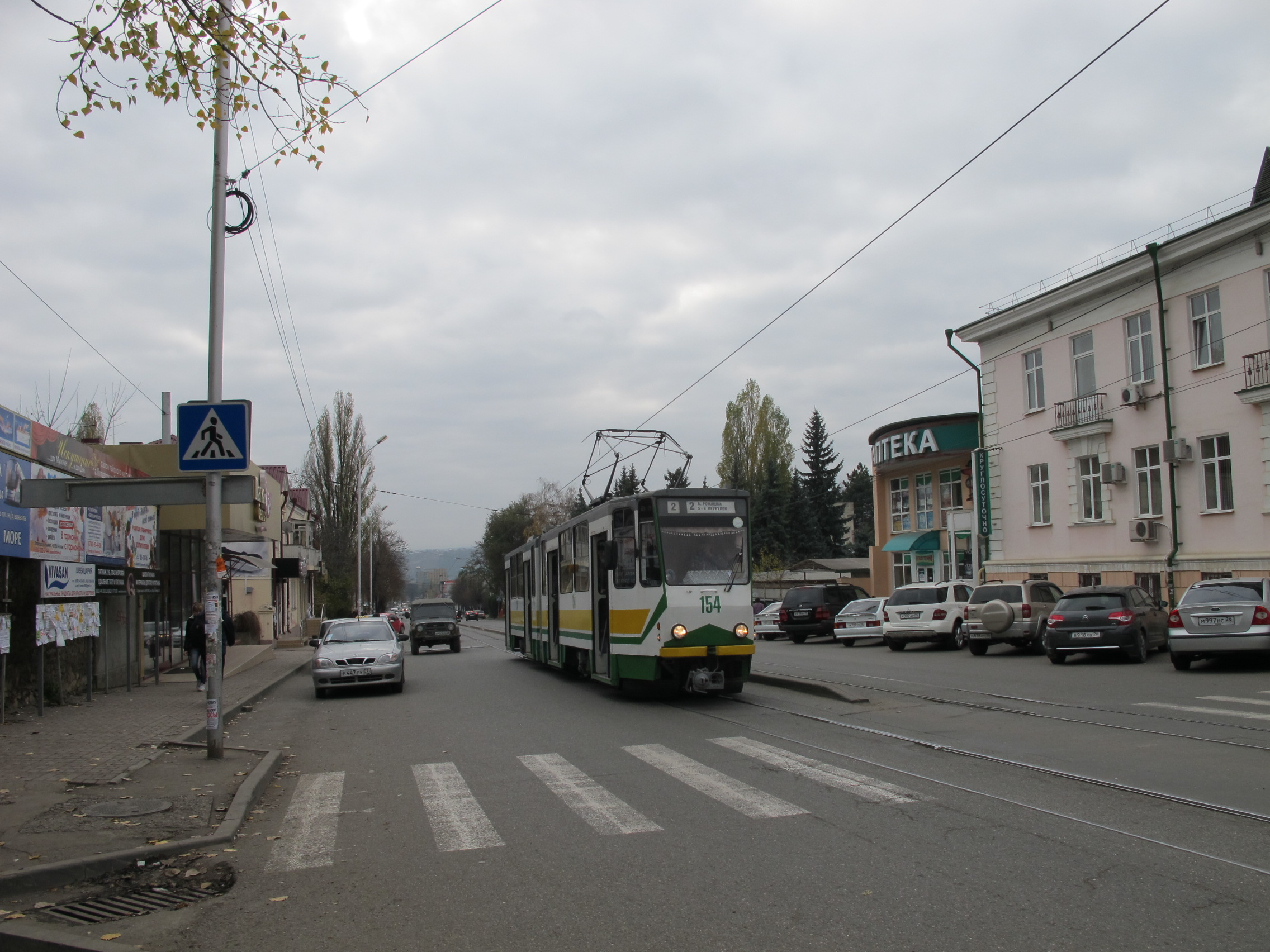 Проспект 40 лет Октября в Пятигорске